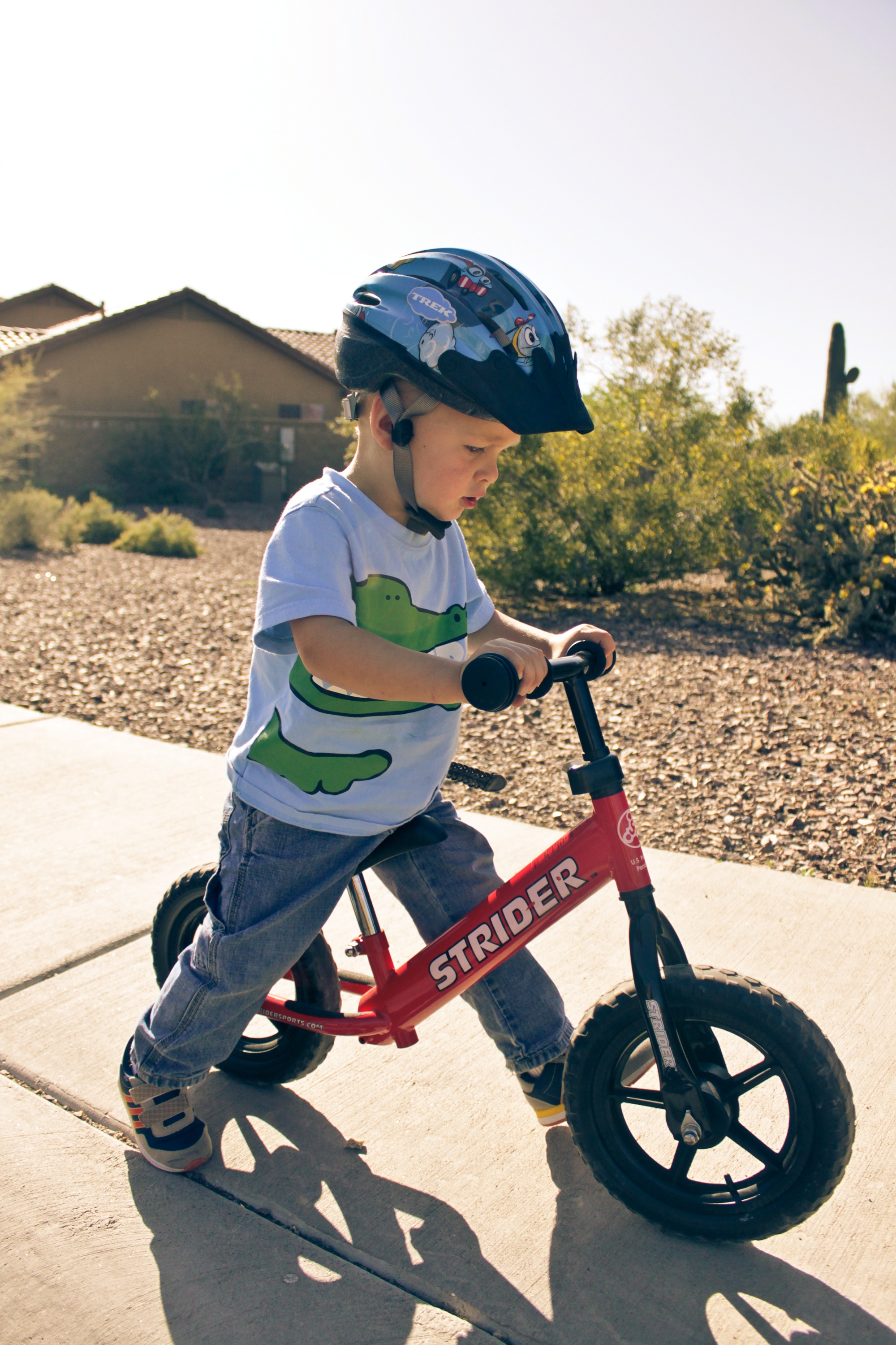 Strider PREbike